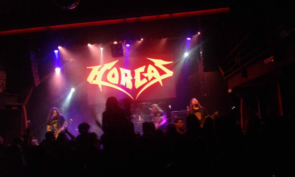 Horcas en vivo (Mendoza, 2017).